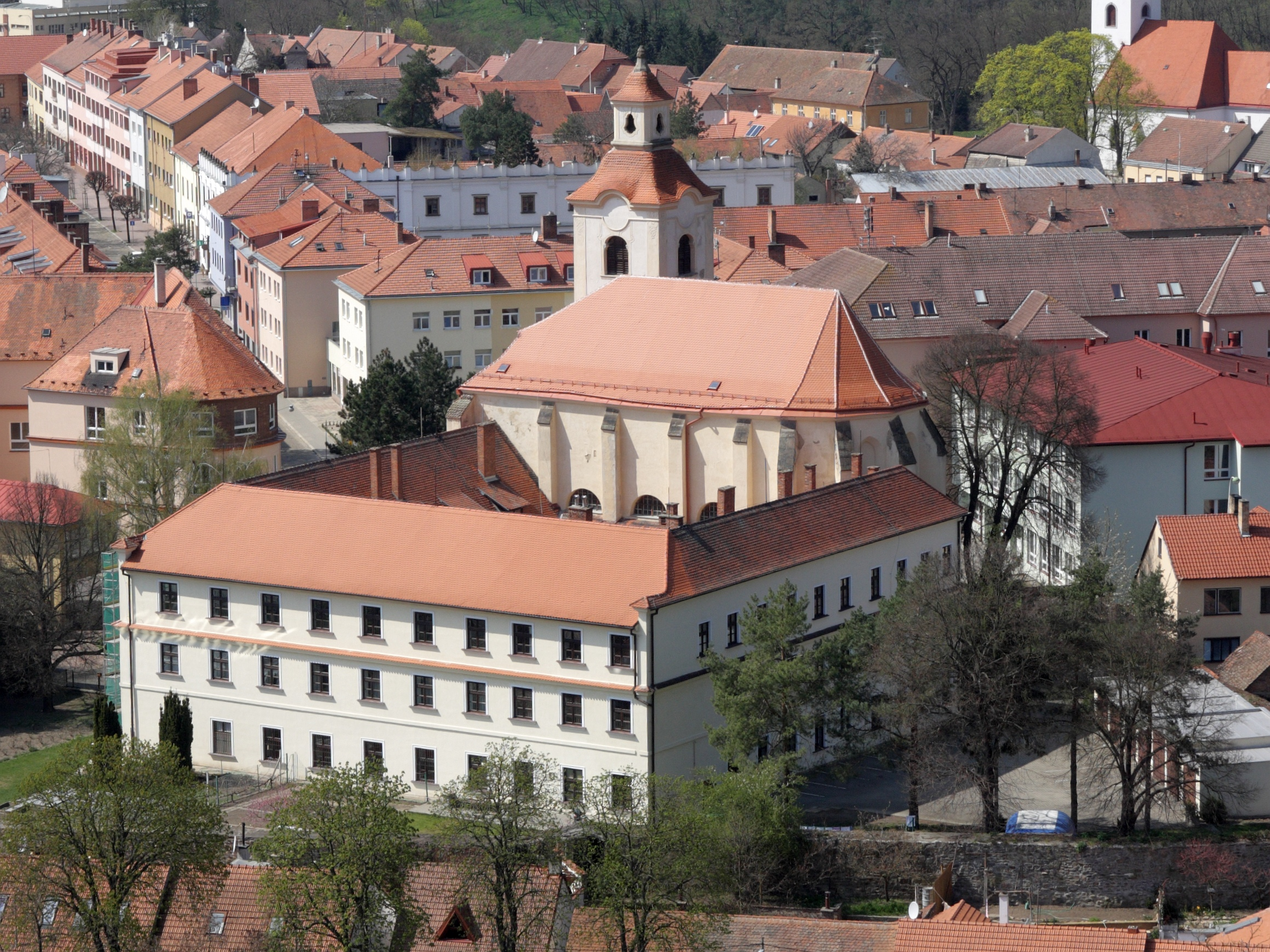 Moravský Krumlov - kostel sv Bartoloměje a bývalý klášter.